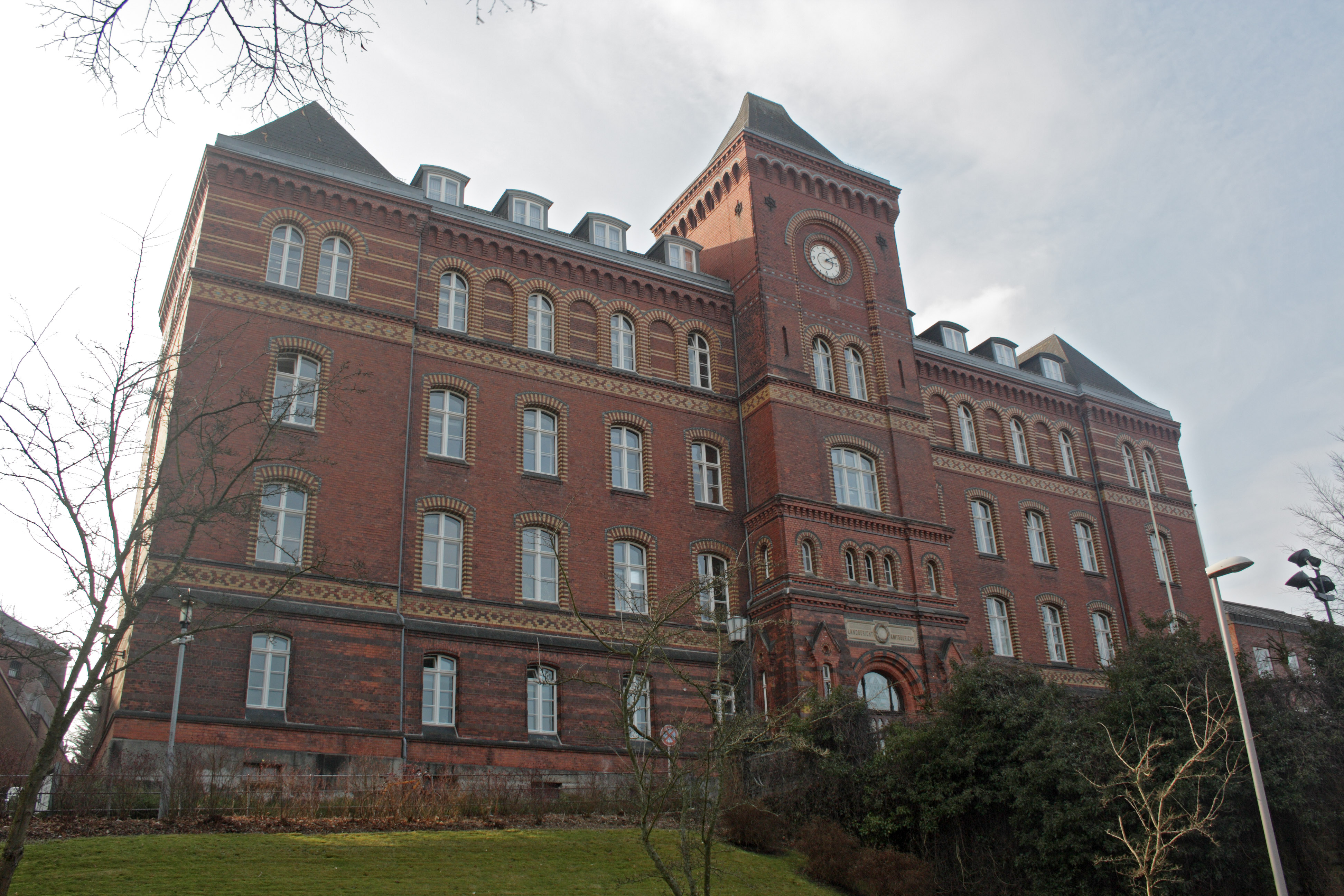 Gerichtsgebäude in Flensburg. Beherbergt das Amtsgericht und Landgericht.